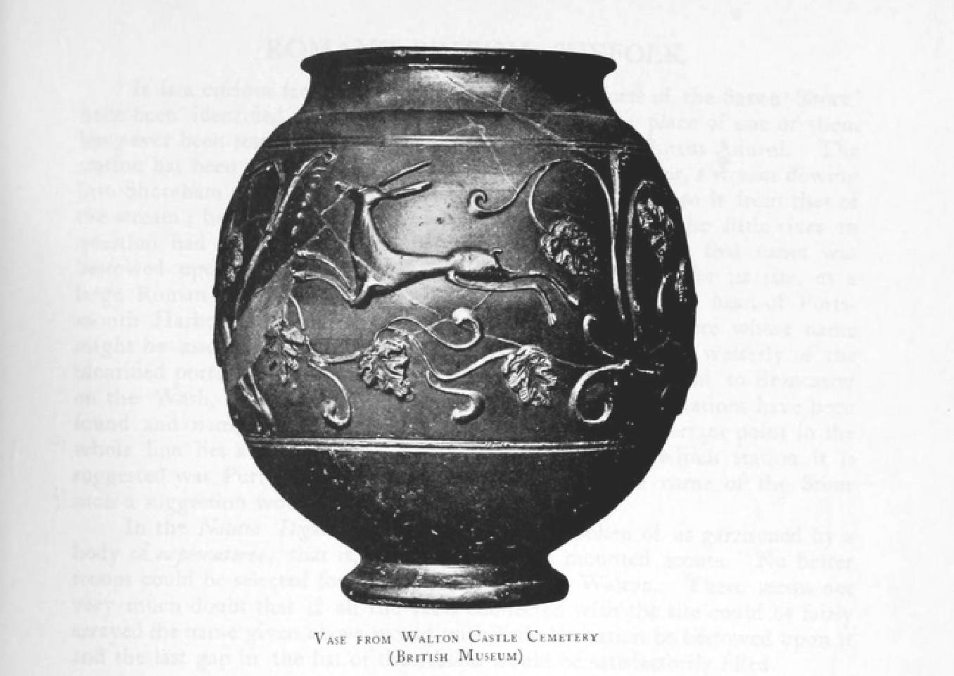 Römische Vase (samian ware) mit Relief einer Jagdszene und Pflanzenornamenten, gefunden Ende des 19. Jahrhunderts in Felixstowe/Walton Castle (GB)